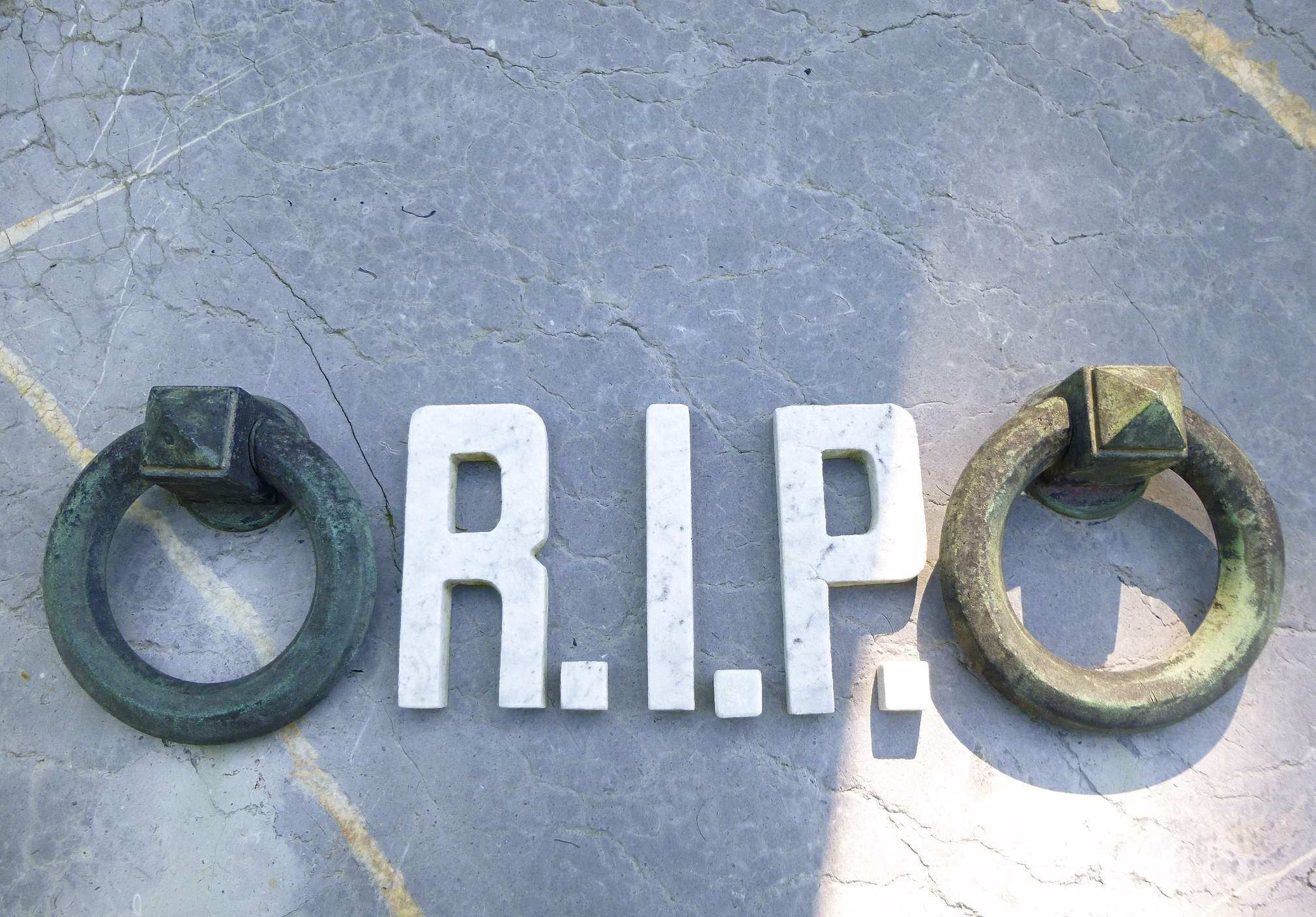 Cementerio de Polloe, en Donostia-San Sebastián